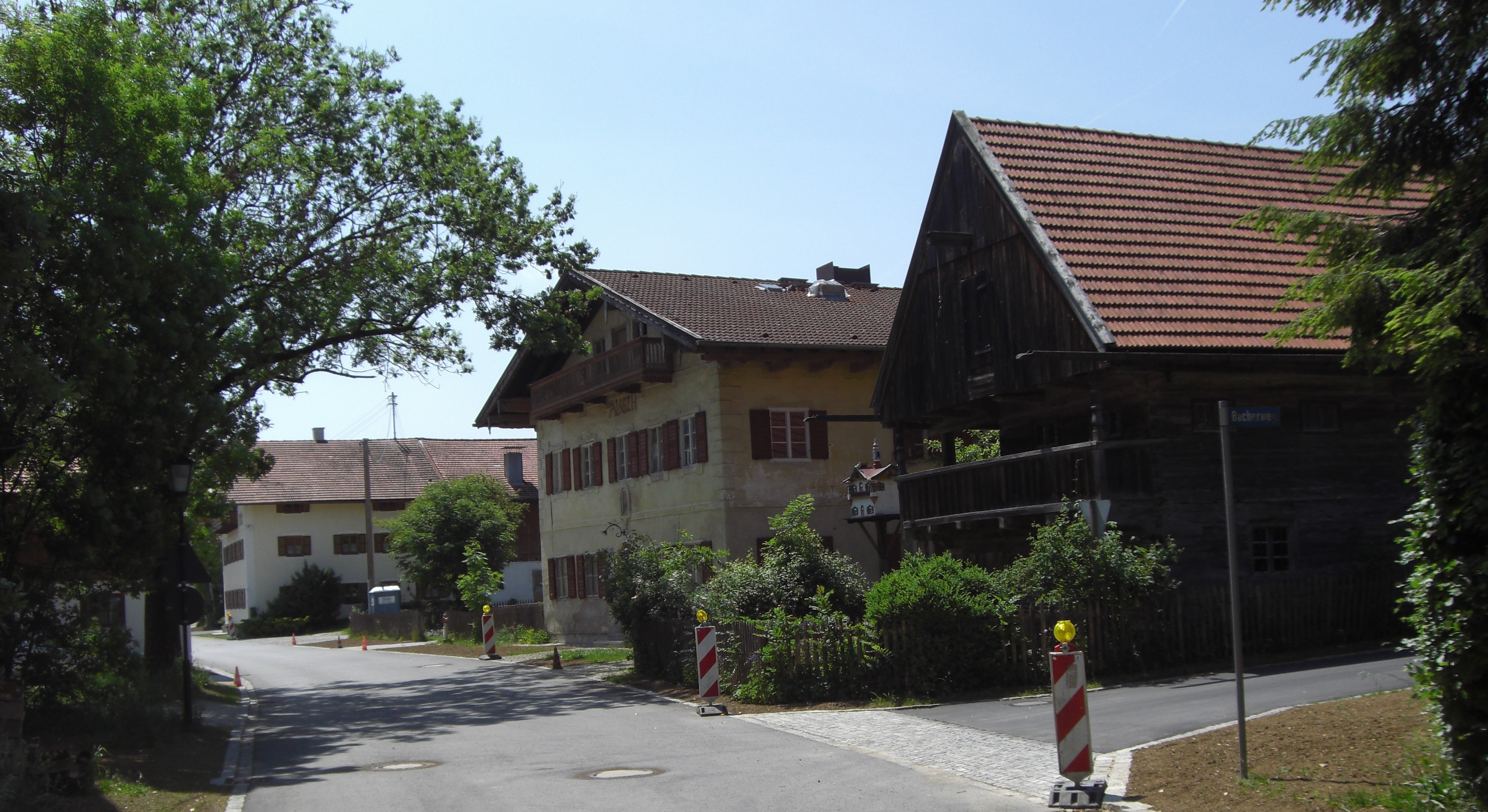 Ensemble in Arget, Sauerlach, Oberbayern